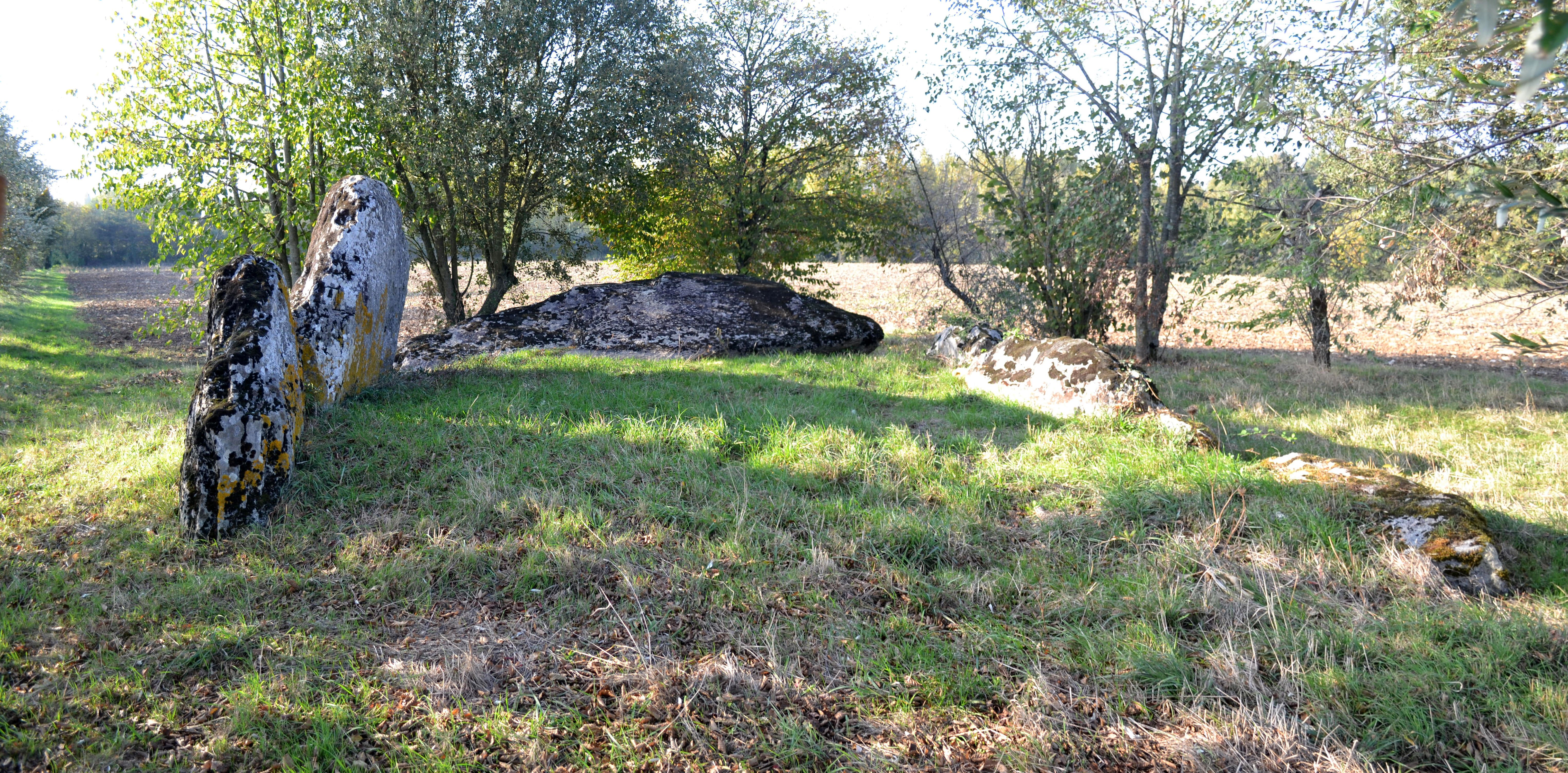 Dolmen de Pierre-Folle à Thiré (49). Vue de puis l'est.